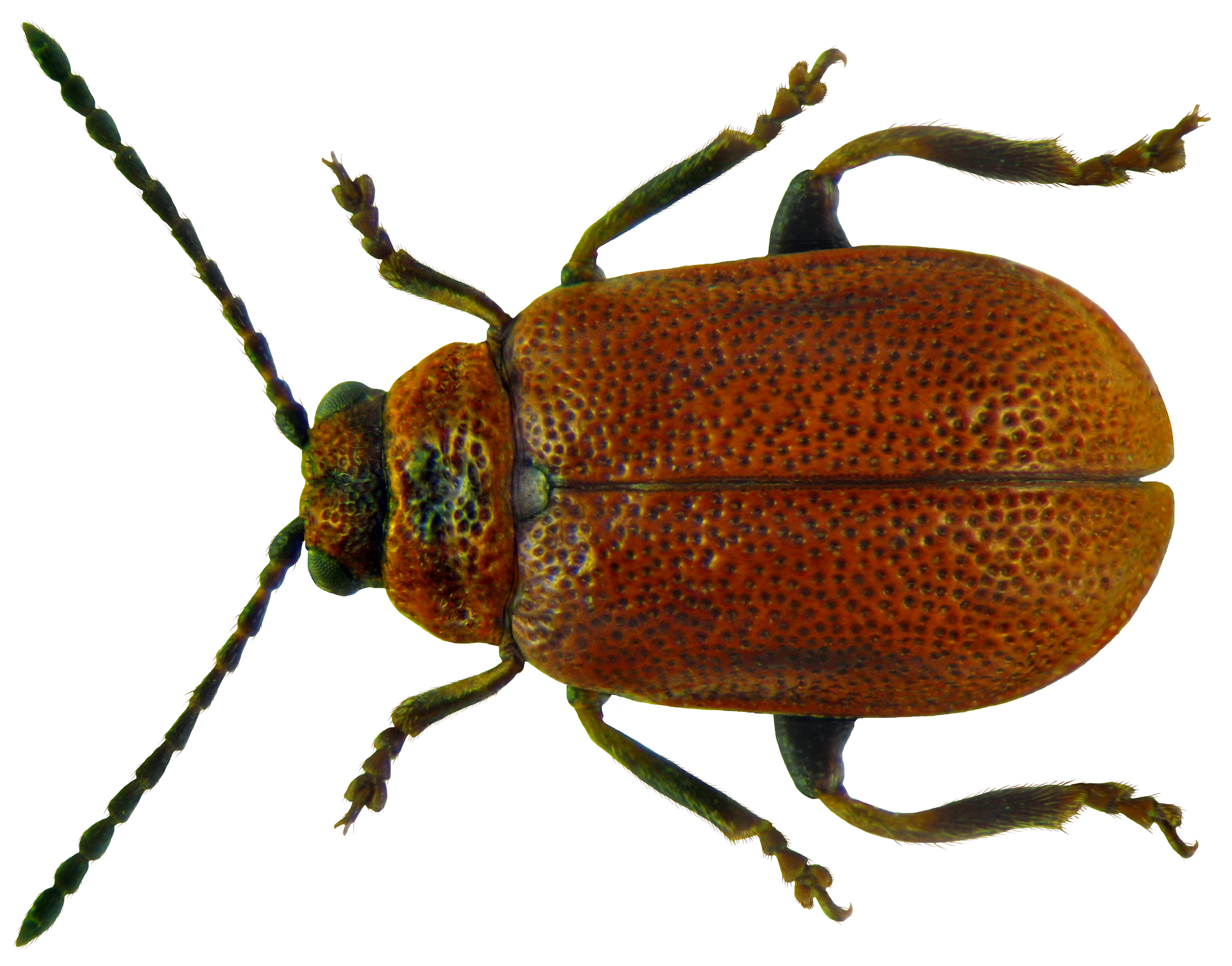 Lochmaea crataegi (Forster, 1771) male Familie: Chrysomelidae Groesse: 4-5 mm Verbreitung: Europa Oekologie: auf blühendem Crataegus Fundort: Germania, Bayern, Oberfranken, Selbitz leg.det. U.Schmidt, 1972 Photo: U.Schmidt, 2011